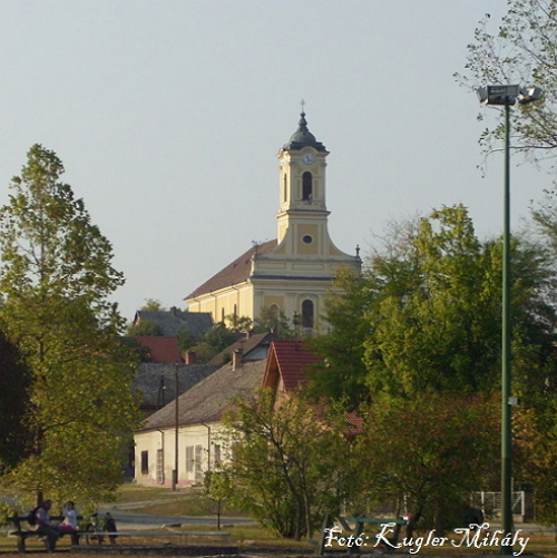 Ercsi római katolikus templom